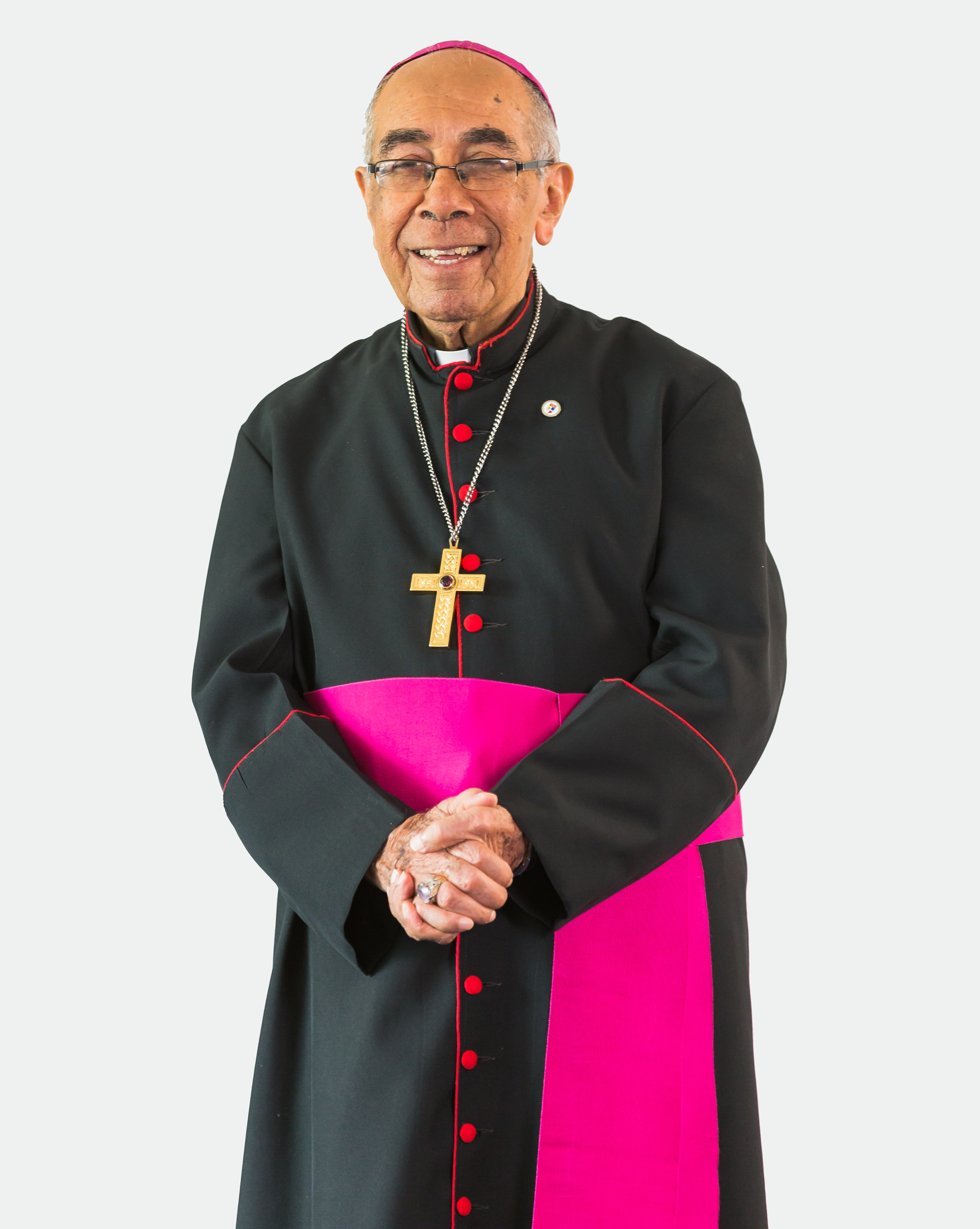 Obispo Jesús María de Jesús Moya